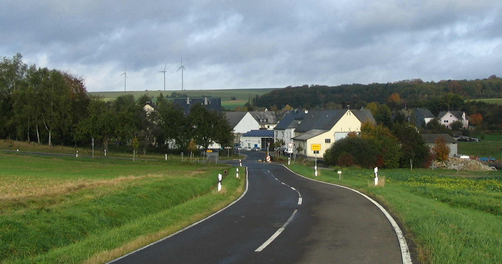 Südansicht von Budenbach/Hunsrück